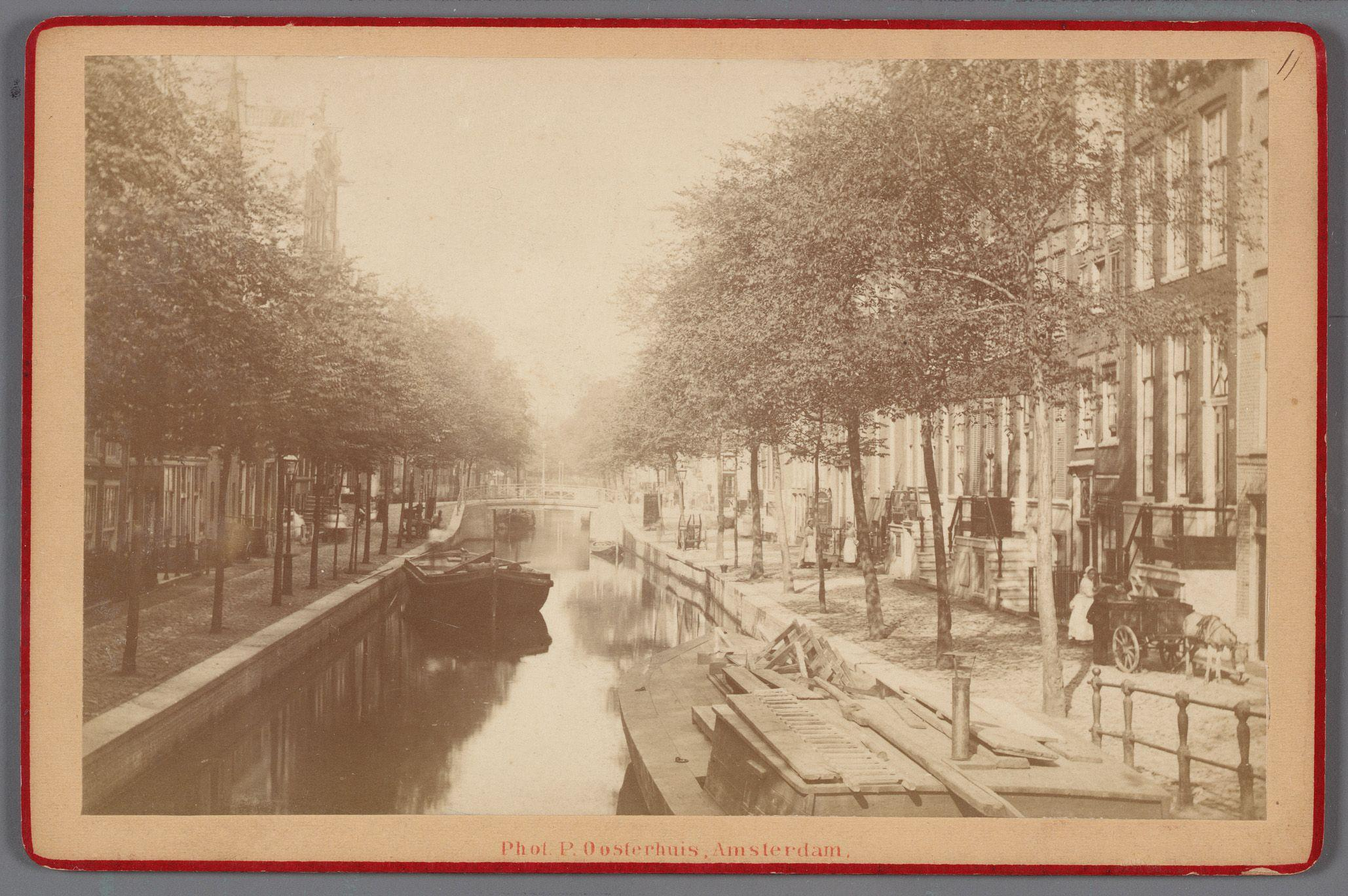 Beschrijving Oudezijds Achterburgwal 221 en lager. Nummer 221 is het eerste huis op de voorgrond rechts Gezien naar Brug 216 voor het Rusland (rechts). Documenttype foto Vervaardiger Oosterhuis, Pieter Collectie Collectie Stadsarchief Amsterdam: kabinetfoto's Datering 1875 ca. Geografische naam Oudezijds Achterburgwal Oudezijds Achterburgwal Inventarissen Afbeeldingsbestand 010005001431 Generated with Dememorixer